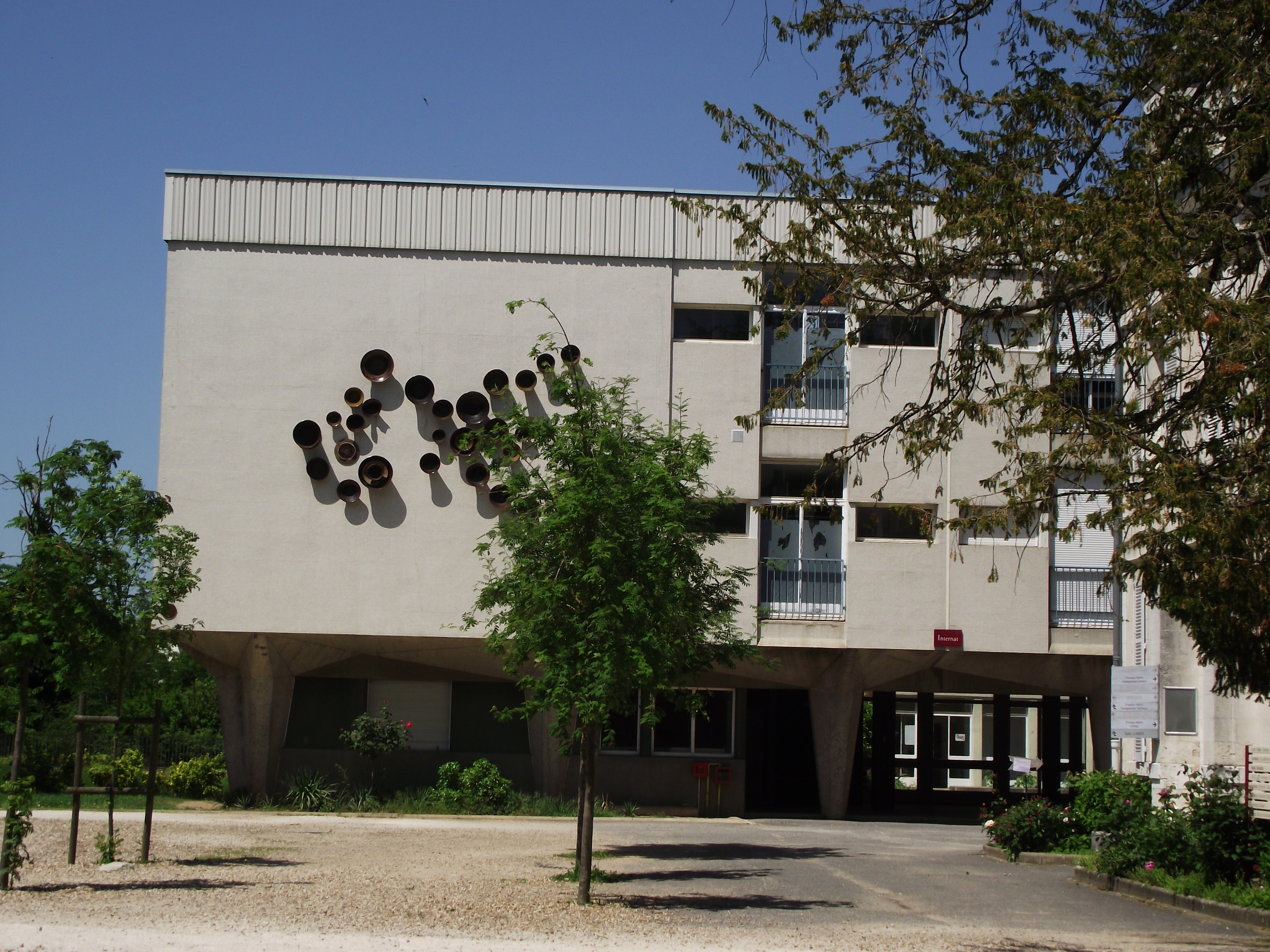 Internat du lycée Augustin-Thierry, dans le bâtiment J. Blois.